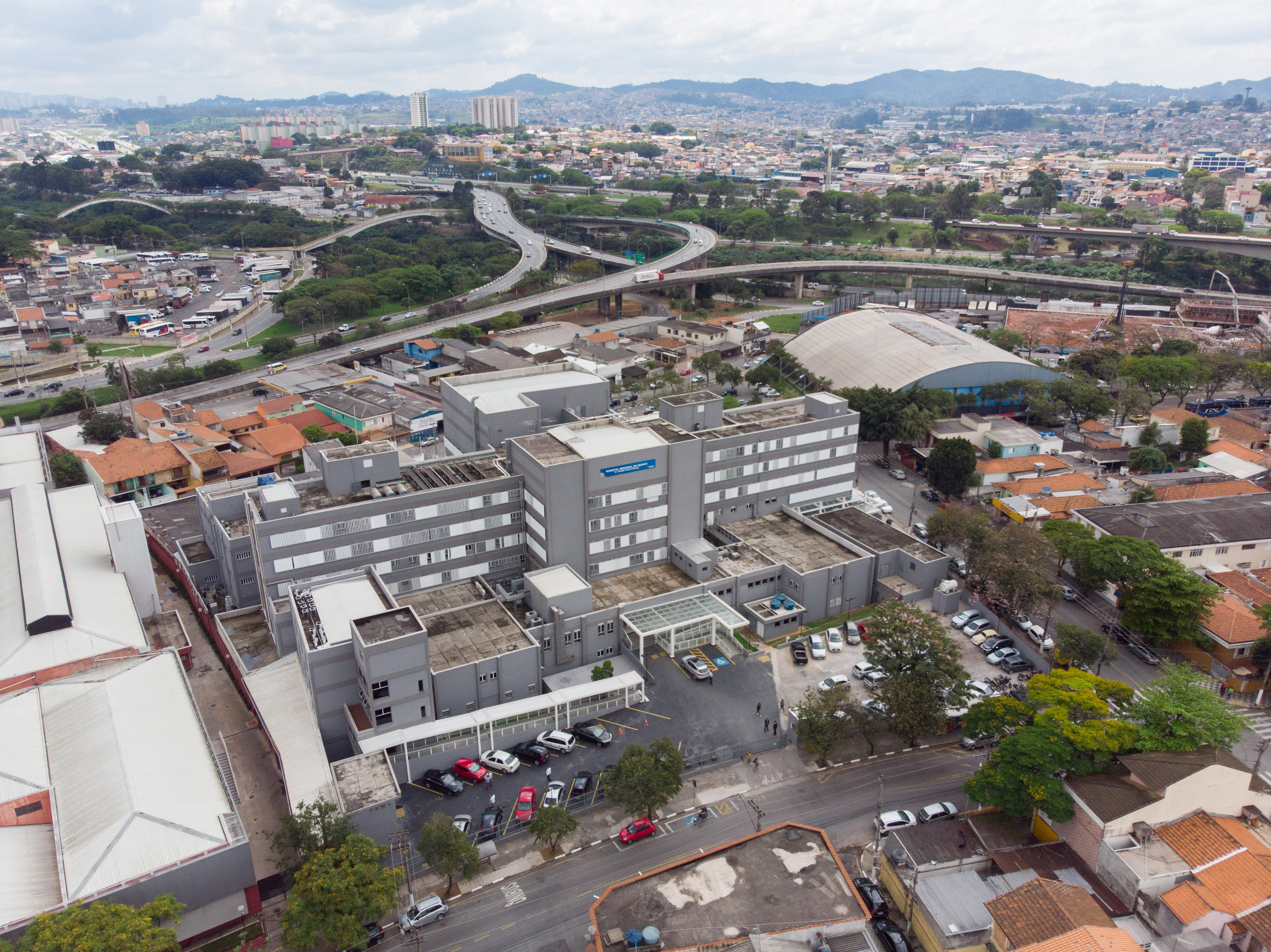 O governador Márcio França, realiza visita técnica ao Hospital Regional de Osasco. Local: Osasco/SP Data: 09/10/2018. Foto: Governo do Estado de São Paulo